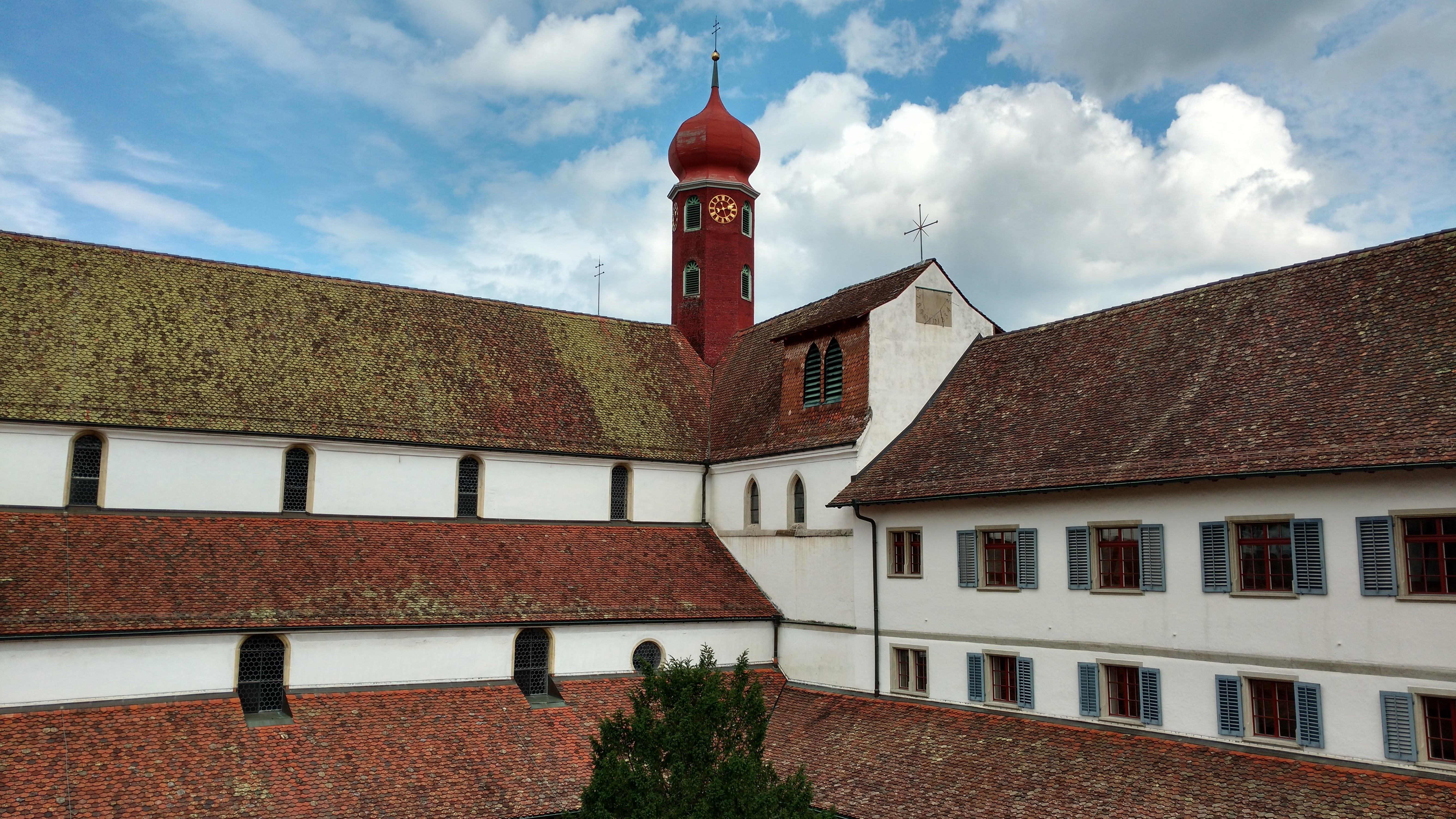 Bild vom Innenhof der Kantonsschule Wettingen